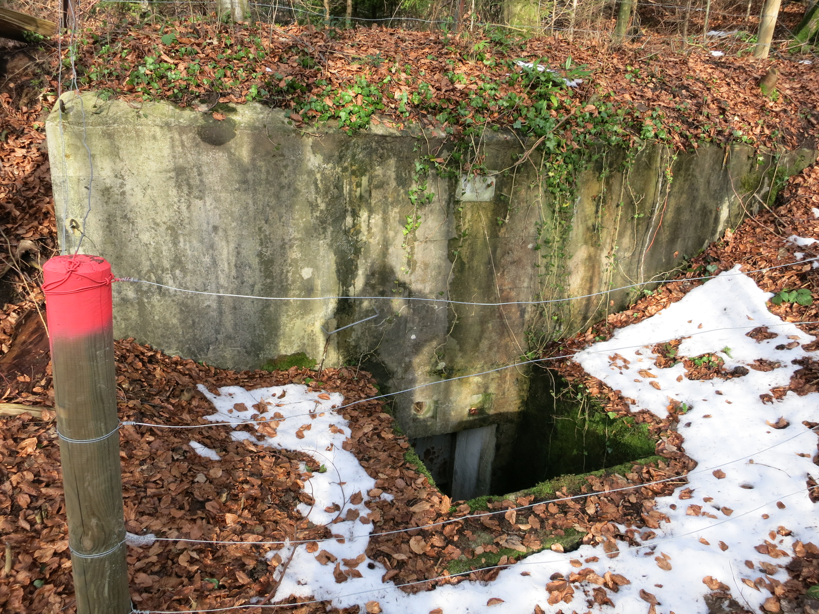 Artilleriestellung Haslen, Birmensdorf ZH, Schweiz: Unterstand Stöck A 4984 Haslen